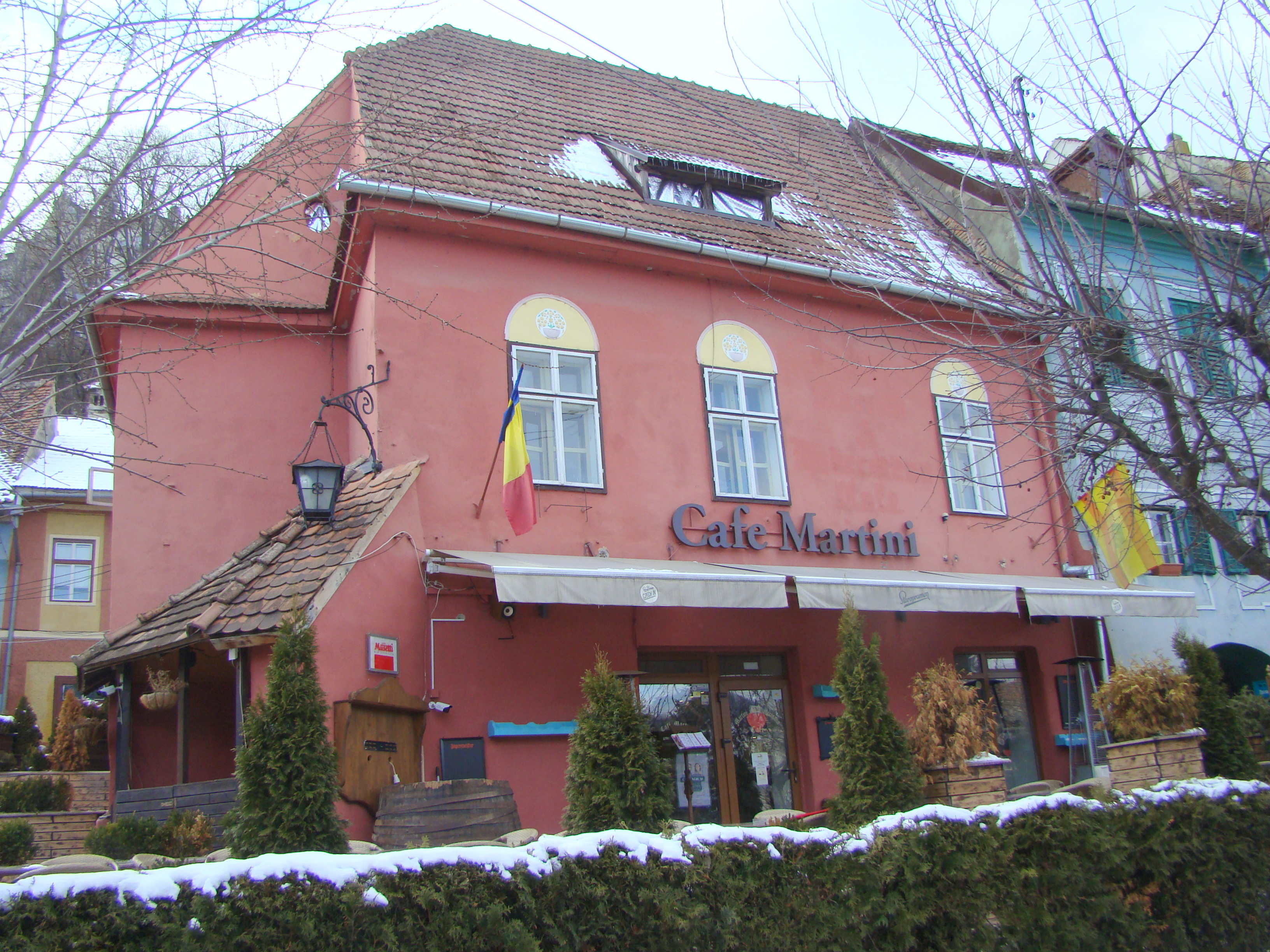 Casă, municipiul Sighișoara, Piața Oberth Hermann 42 sec. XVI, sec. XVIII